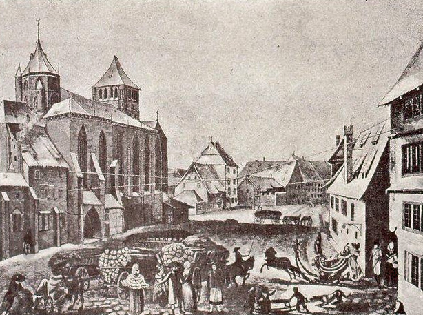 Strasbourg. Thomasplatz. Bibliothèque nationale et universitaire de Strasbourg